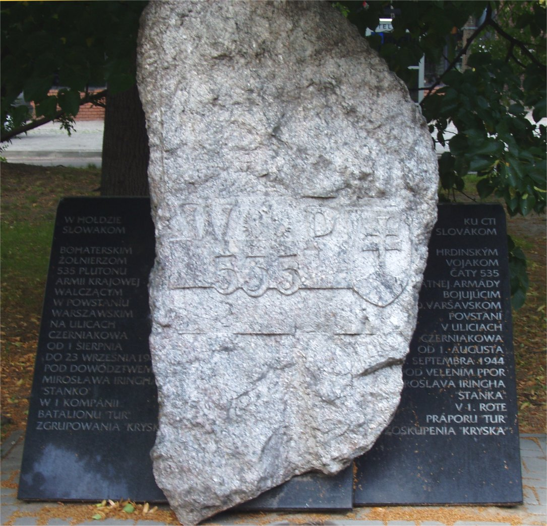 Miejsce pamięci na terenie skweru Iringha w Warszawie na Czerniakowie (fot Zu)